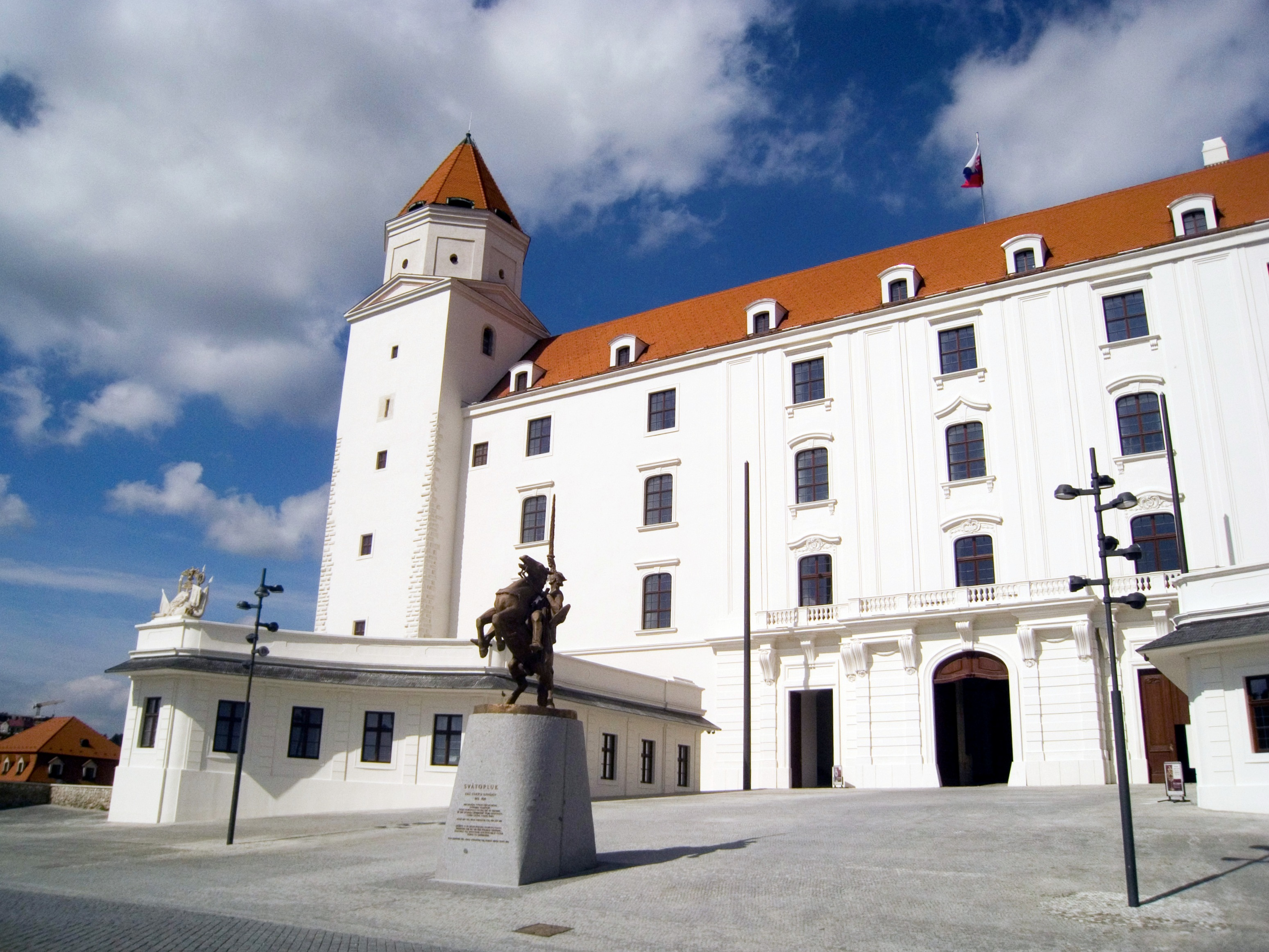 Bratislava Castle, 2010